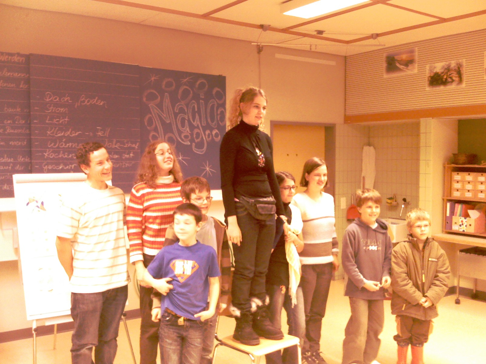 Infanoj dum la Familia Esperanto-renkontiĝo en Sangernboden, Komunumo de Guggisberg, Kantono Berno, Svislando